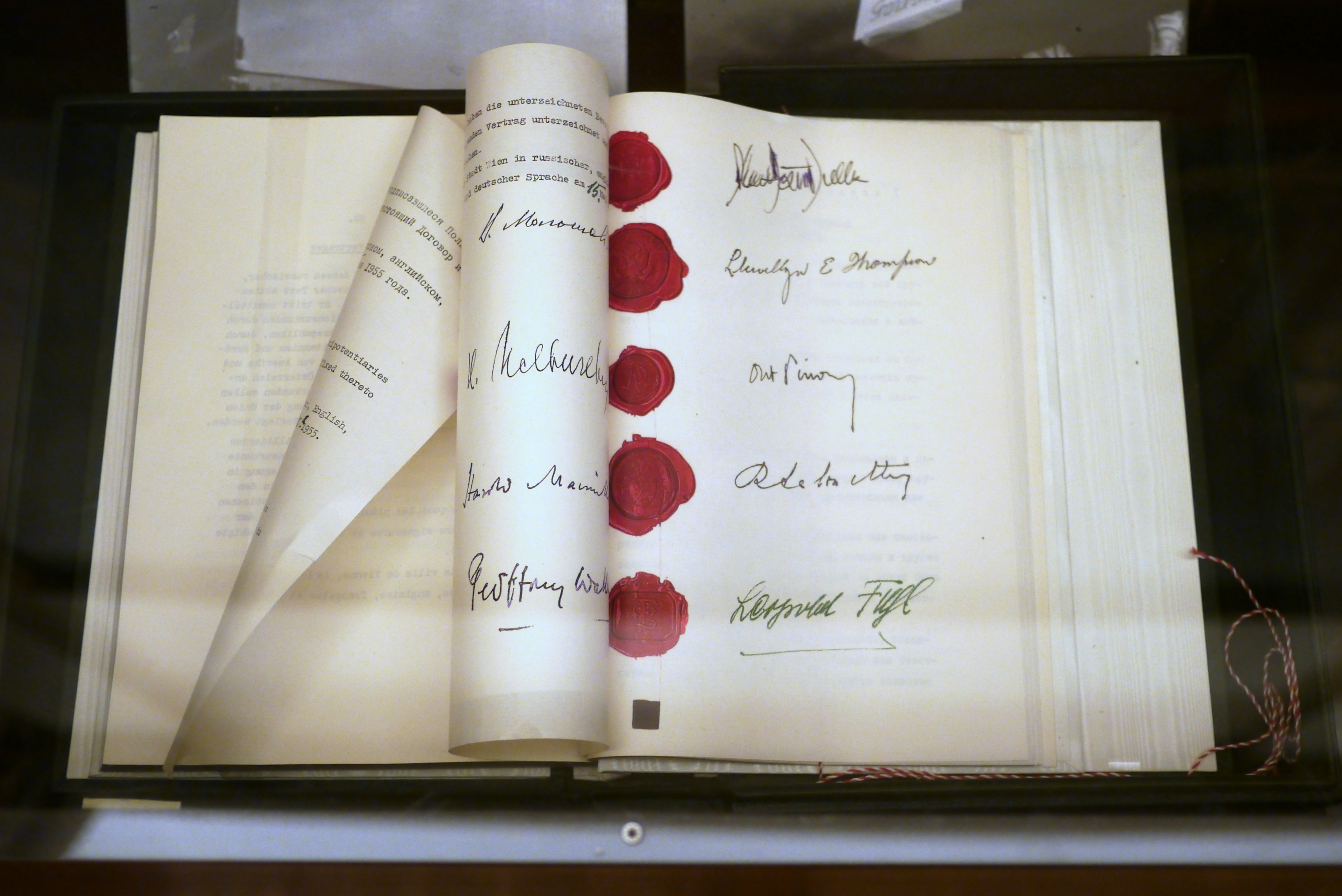 Österreichischer Staatsvertrag Hofburg